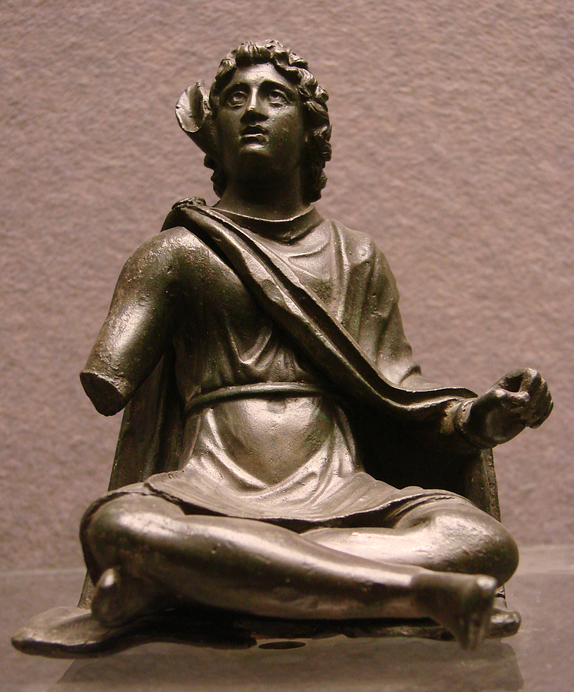 Dieu gaulois à l'oreille de cervidé, sans doute une variante locale du culte de Cernunnos.1er siècle + JC, Amiens.Musée de Picardie à Amiens.